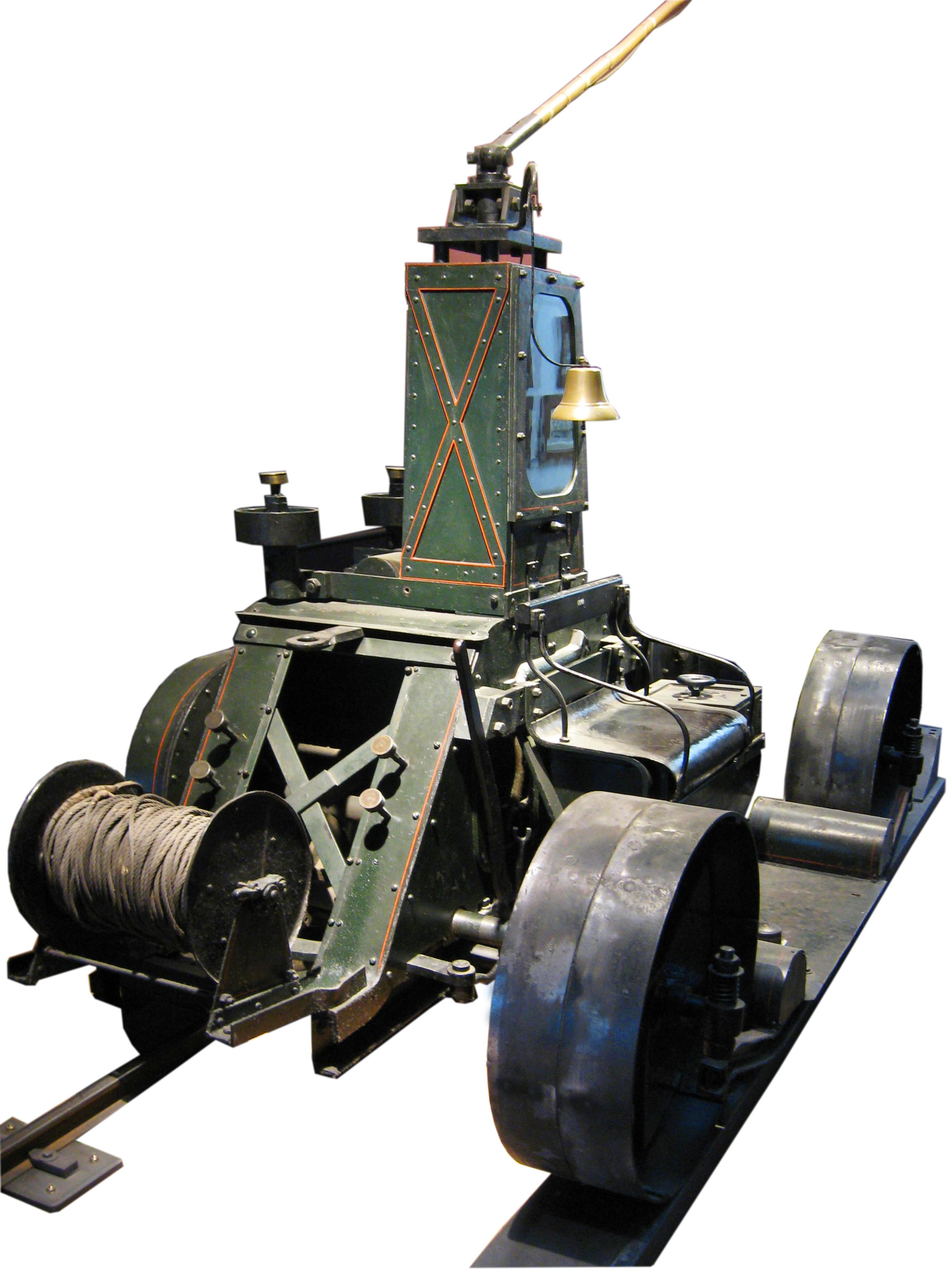 Treidellok Typ Siemens Halske: Elektrisch betriebene Zugmaschine von 1898 zum Treideln; eingesetzt am Finowkanal